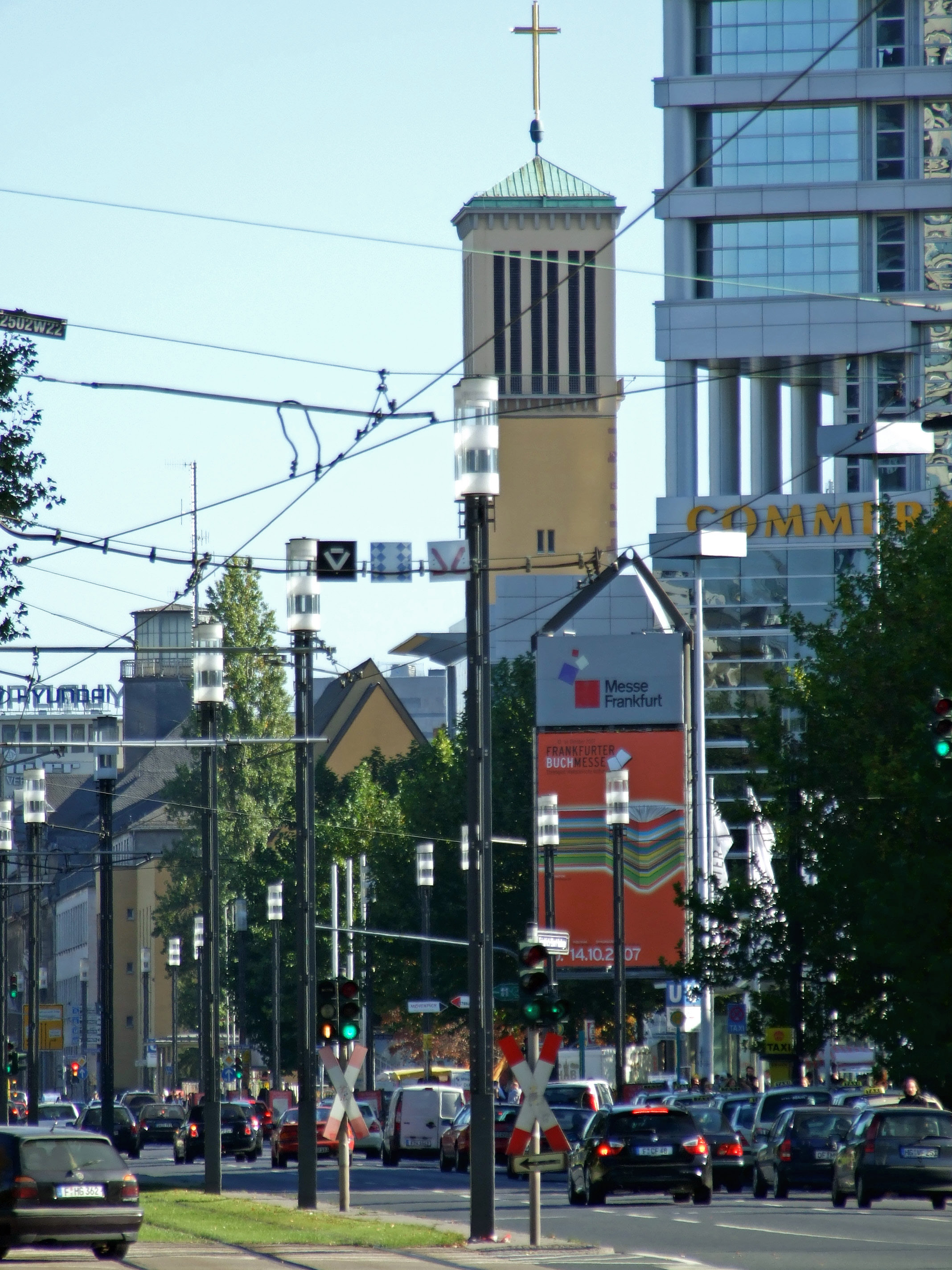 ehemaliges Polizeipraesidium und Matthaeuskirche an der Friedrich-Ebert-Anlage, Richtung Hauptbahnhof